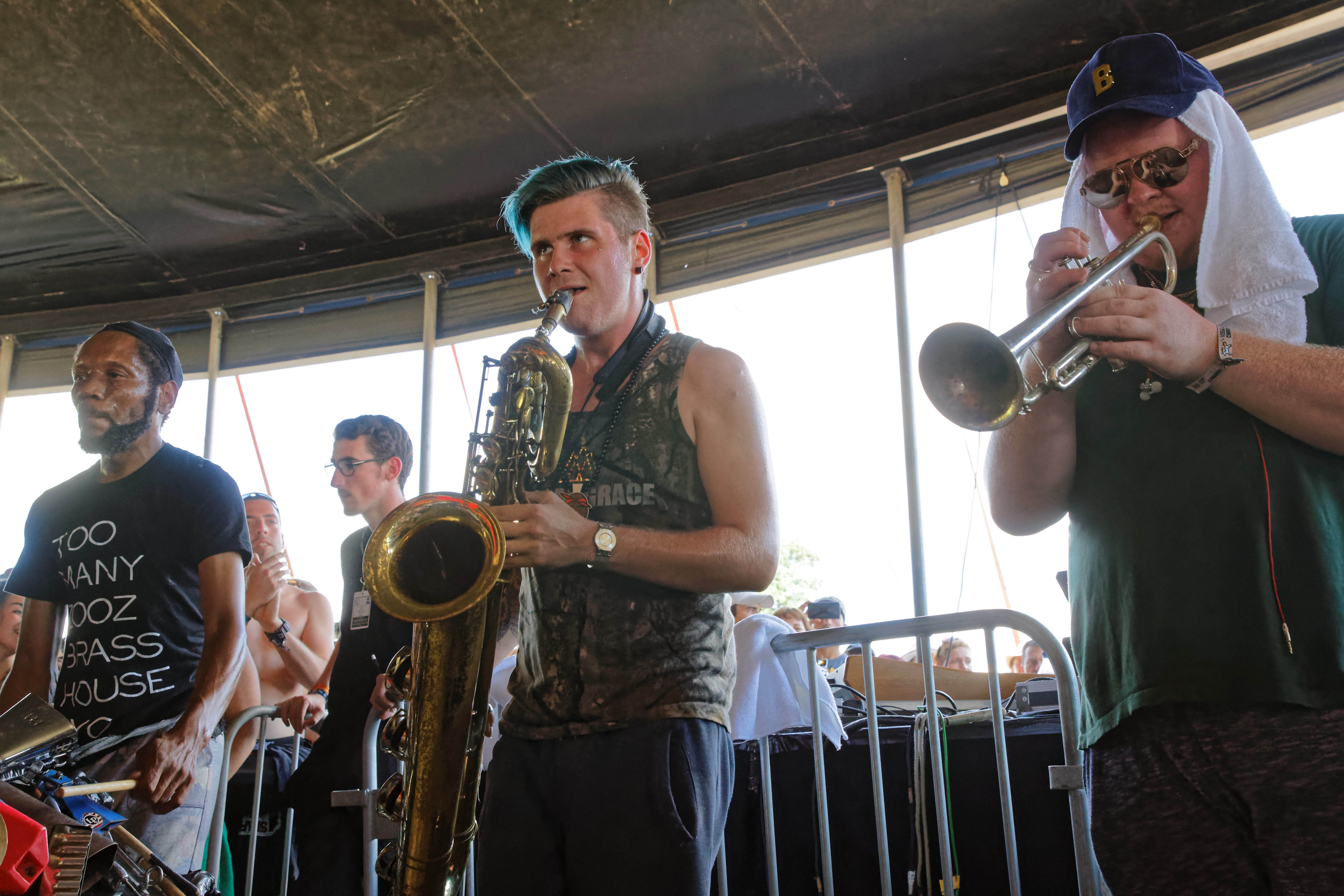 Too Many Zooz en concert lors du festival des vieilles charrues 2016.